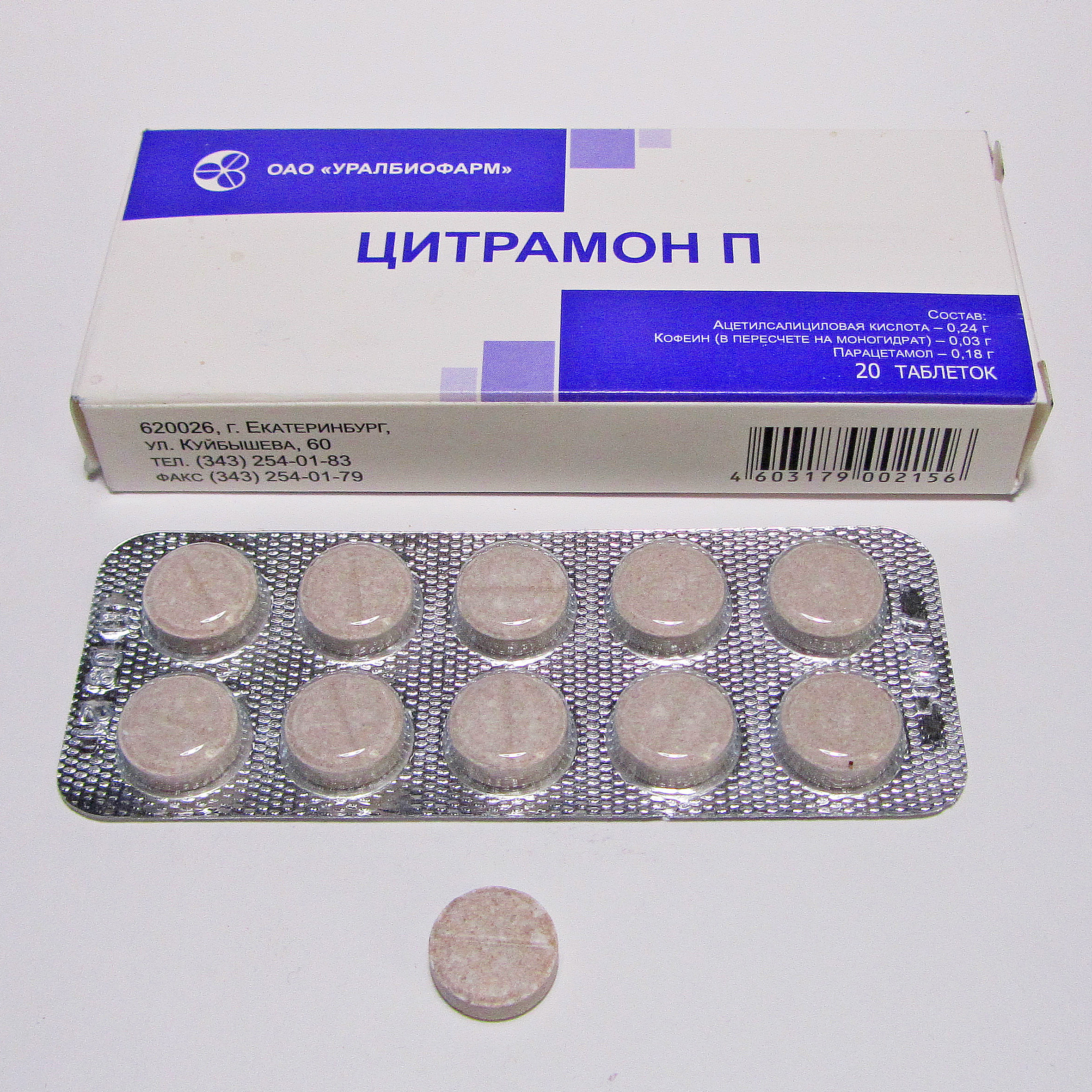 «Цитрамо́н» — анальгетическое, кроверазжижающее, жаропонижающее и противовоспалительное лекарственное средство. Применяют при головной боли и простудных заболеваниях.